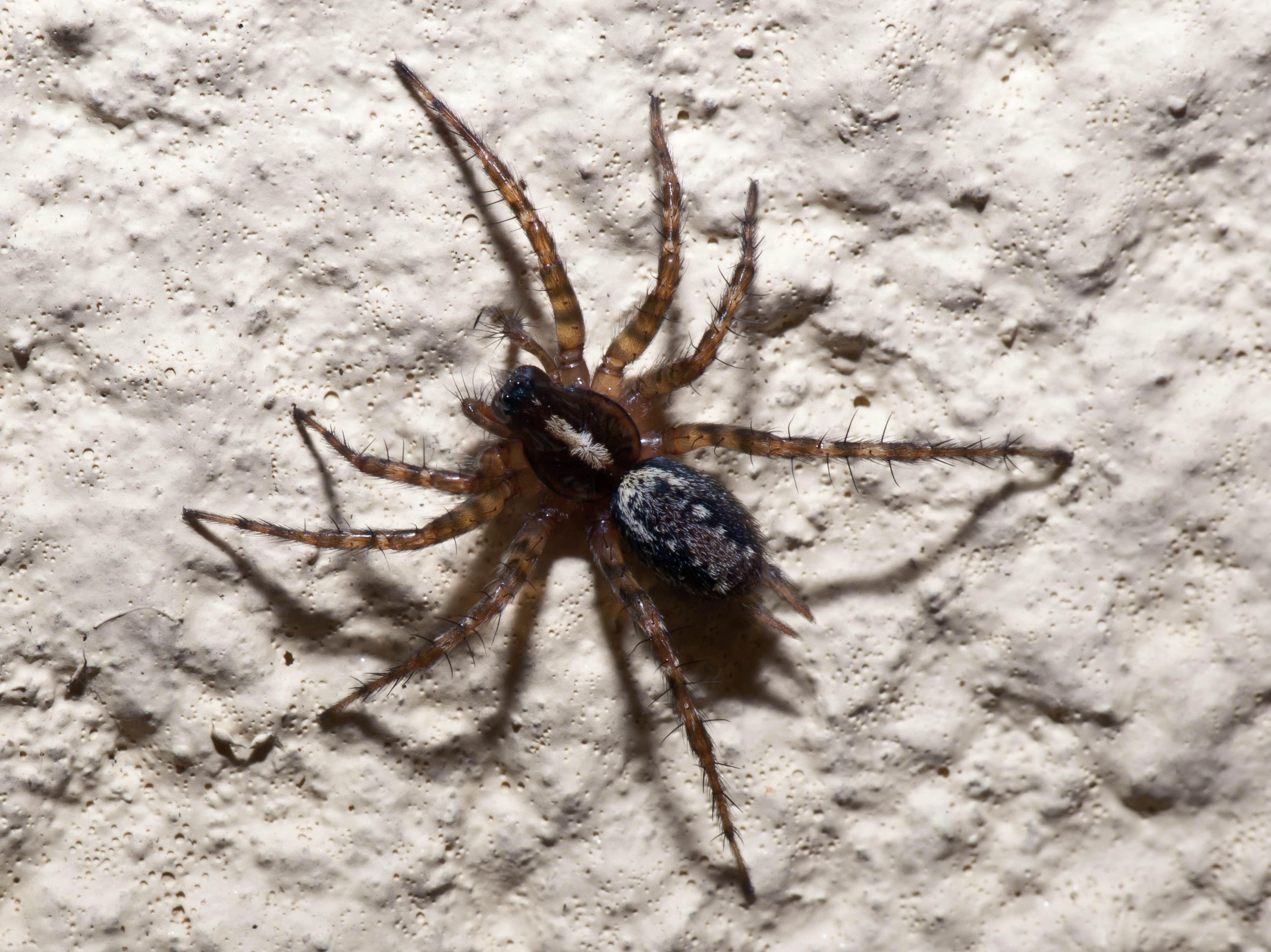 Textrix denticulata (Textrix cf. denticulata) en Valverde, Vilarromarís, Oroso, Galiza